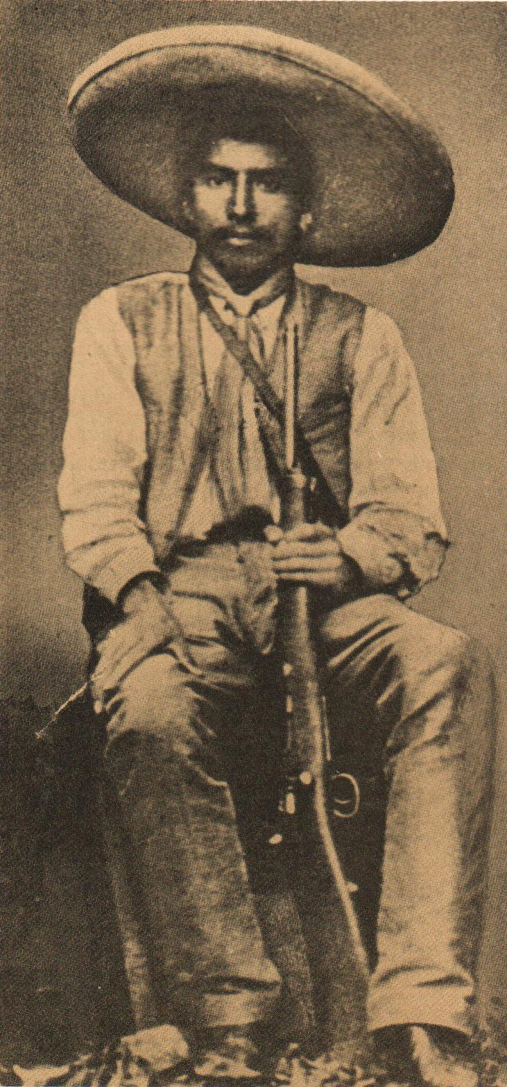 General Ignacio Maya